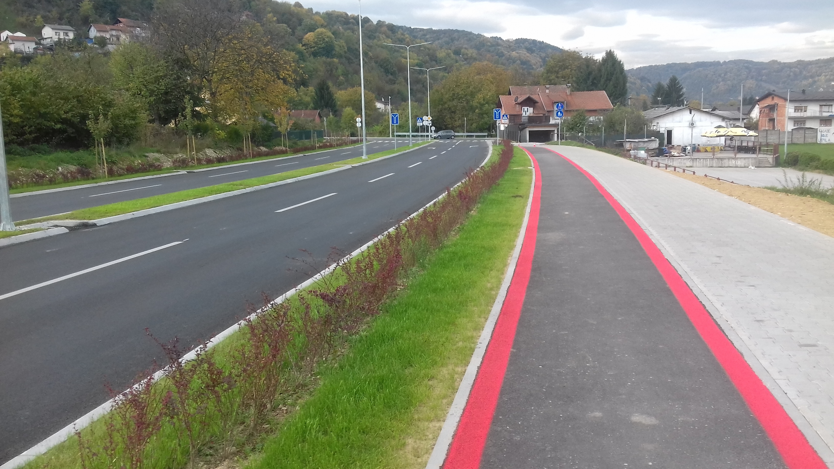 Istočni tranzit je nekad planiran kao zaobilaznica danas kada je završen predstavlja gradski bulevar kroz najveća gradska naselja Starčevica i Obilićevo